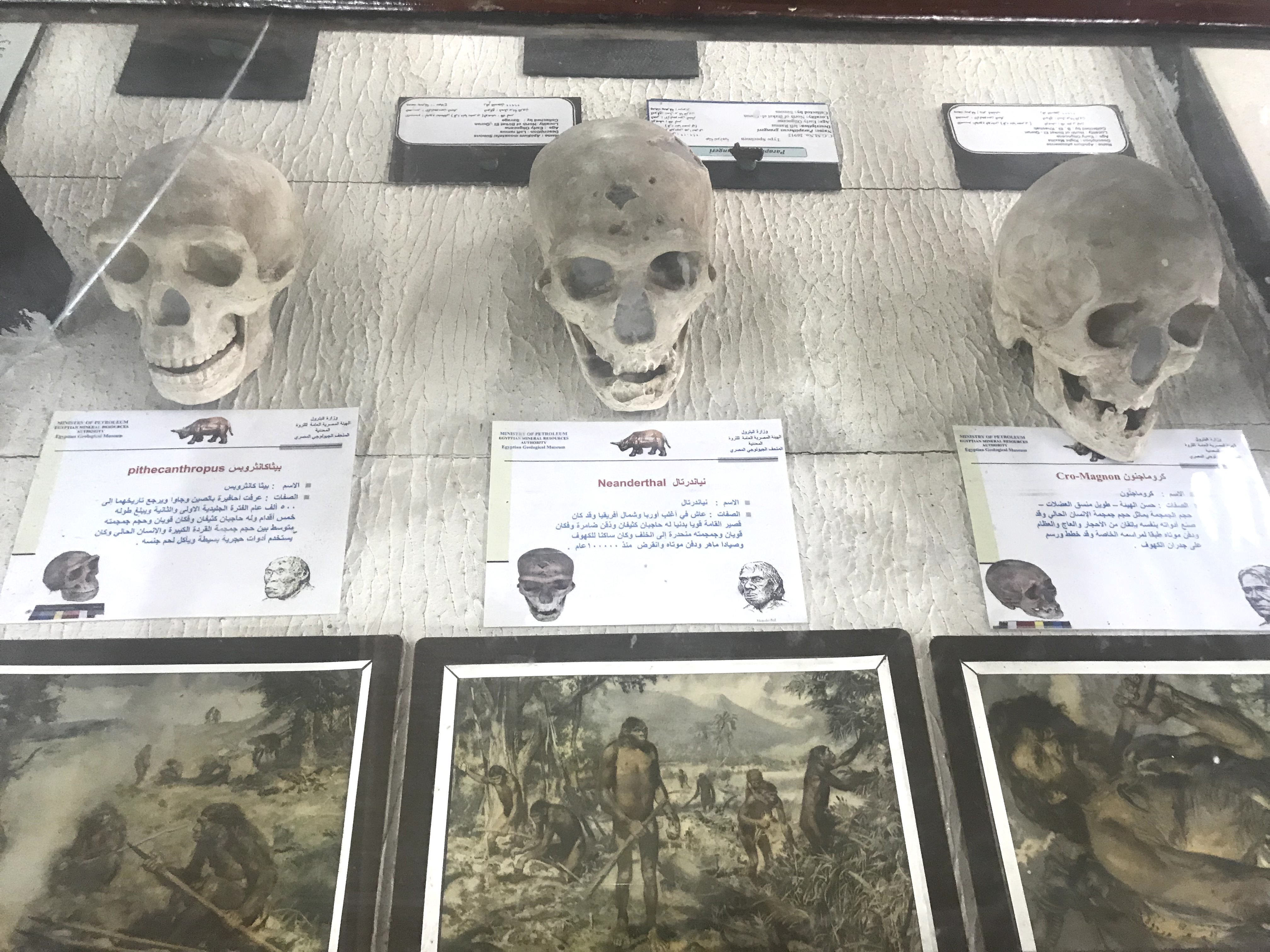 ثلاث أنواع من الجنس البشري. من اليمين الي اليسار (إنسان كرومانيون - إنسان نياندرتال - إنسان منتصب )